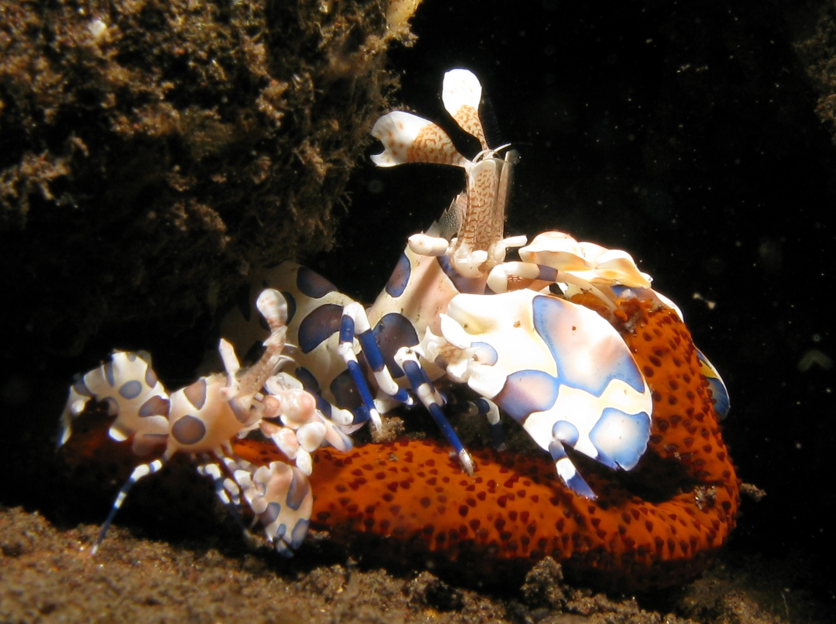 Crevette harlequin (Hymenocera picta).